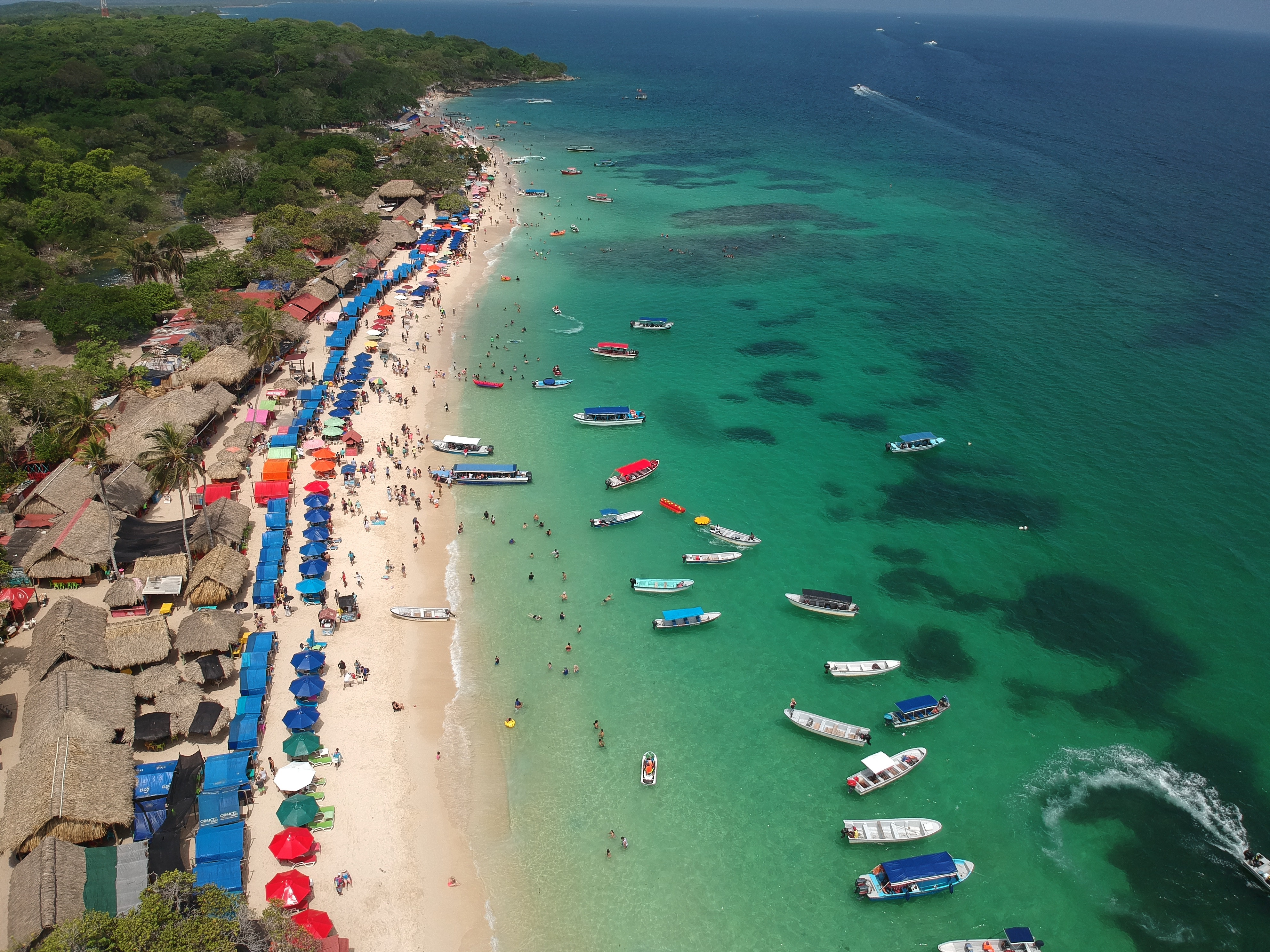 Vista aérea de Playa Blanca, Barú. (por: @f.o.g.photography)